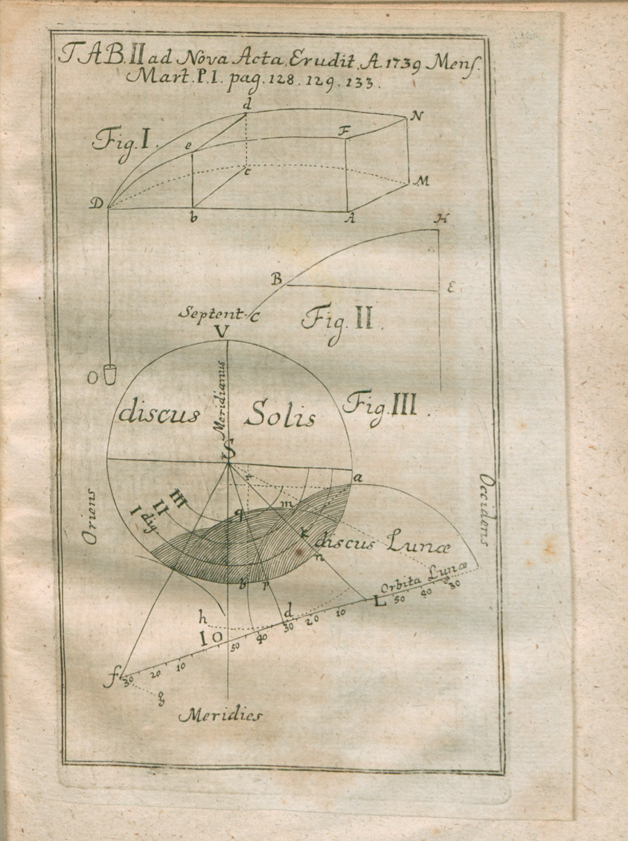 Illustration